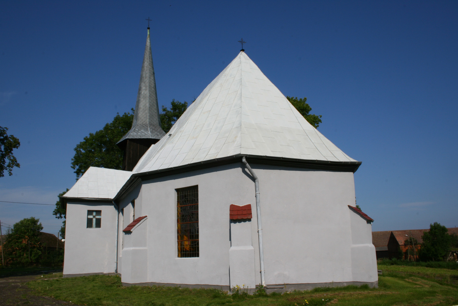 Trzebusz - rzymskokatolicki kościół parafialny p.w. św. Józefa Oblubieńca NMP, XV, XVII